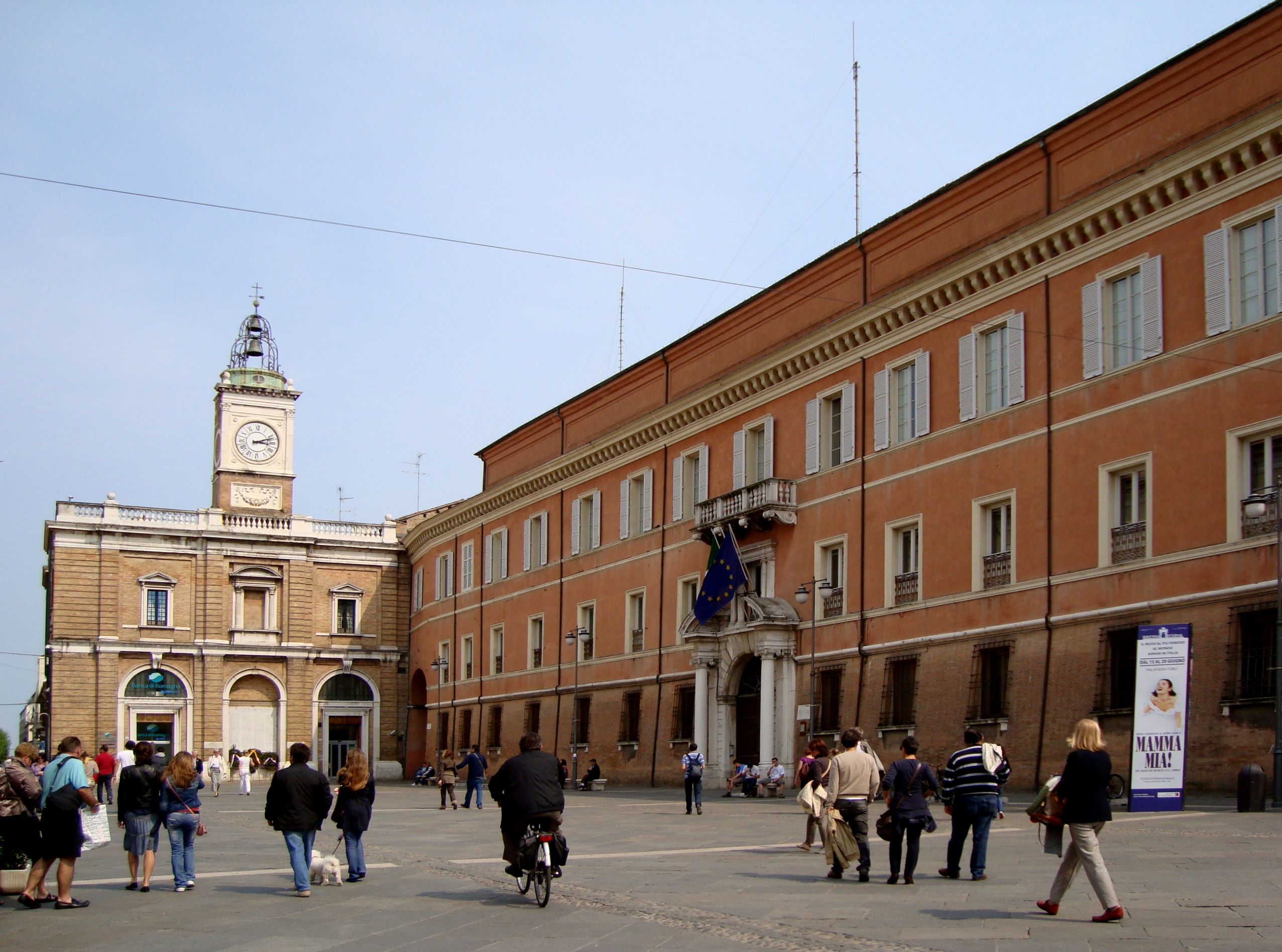 La piazza del popolo à Ravenne (Italie).